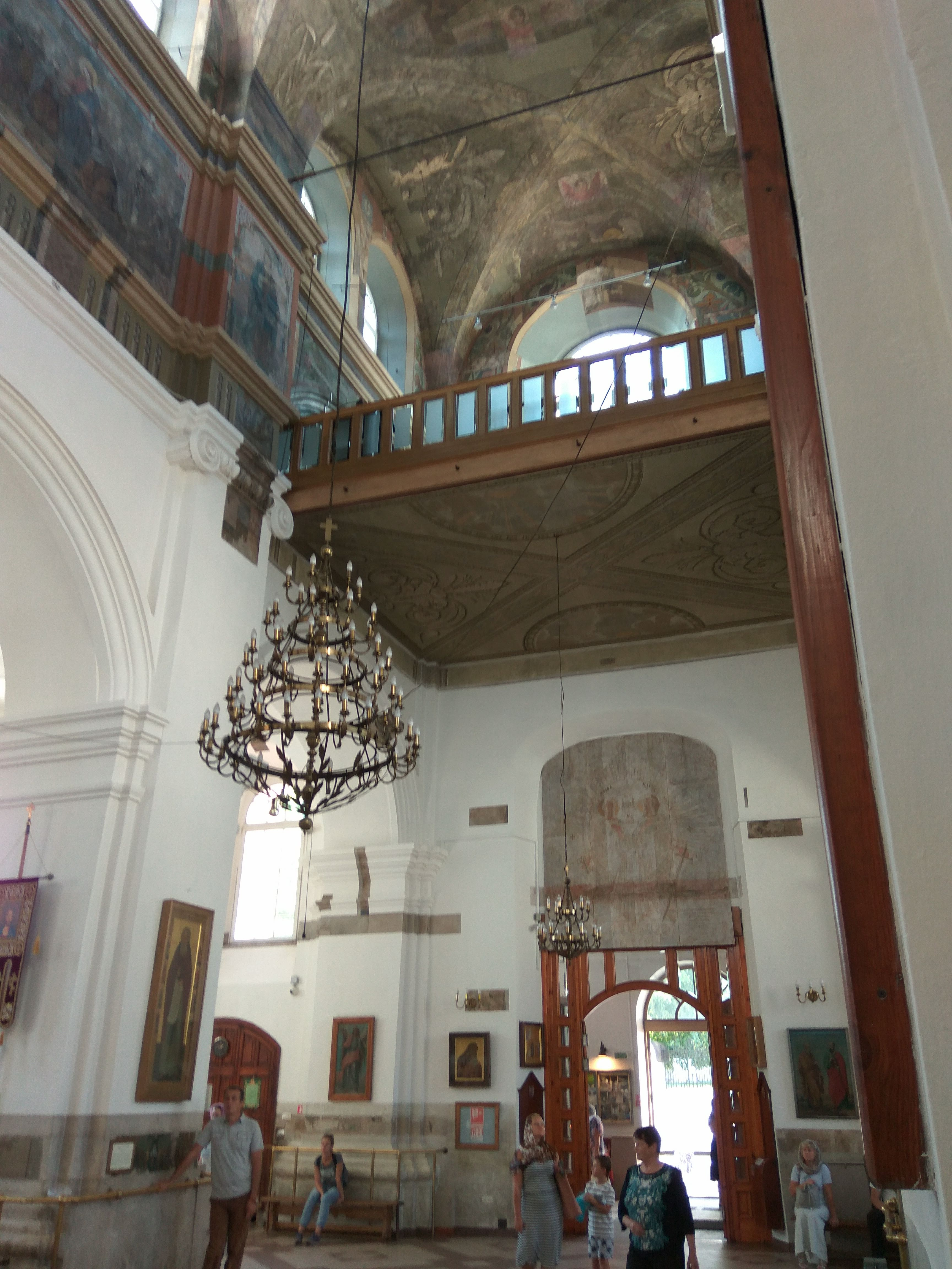 Мінск. Петрапаўлаўская ў жніўні 2018